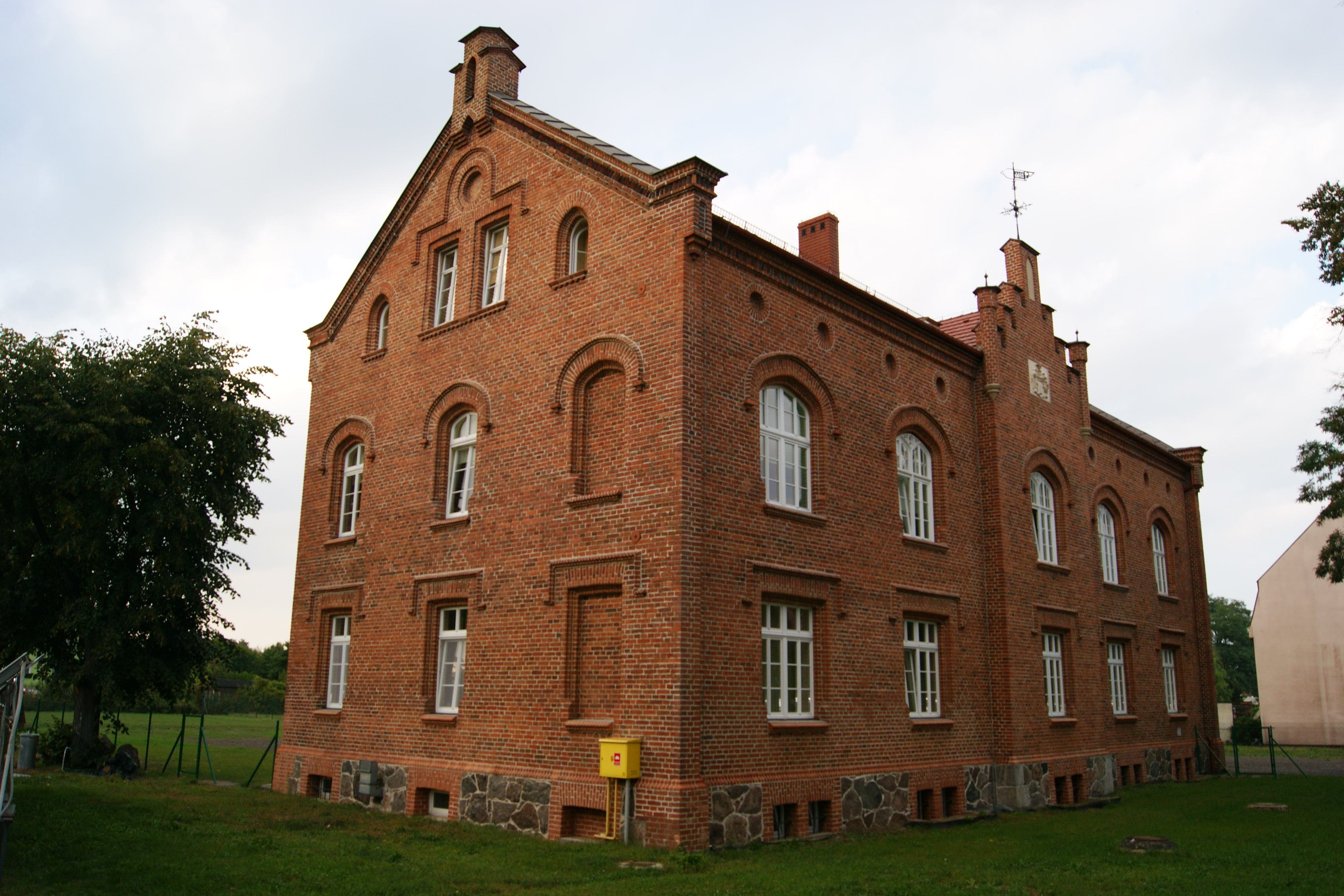 Pleszew, ul. Podgórna 14 - dawny Katolicki Dom Sierot z 1866 r. (zabytek nr rejestr. 720/Wlkp/A)